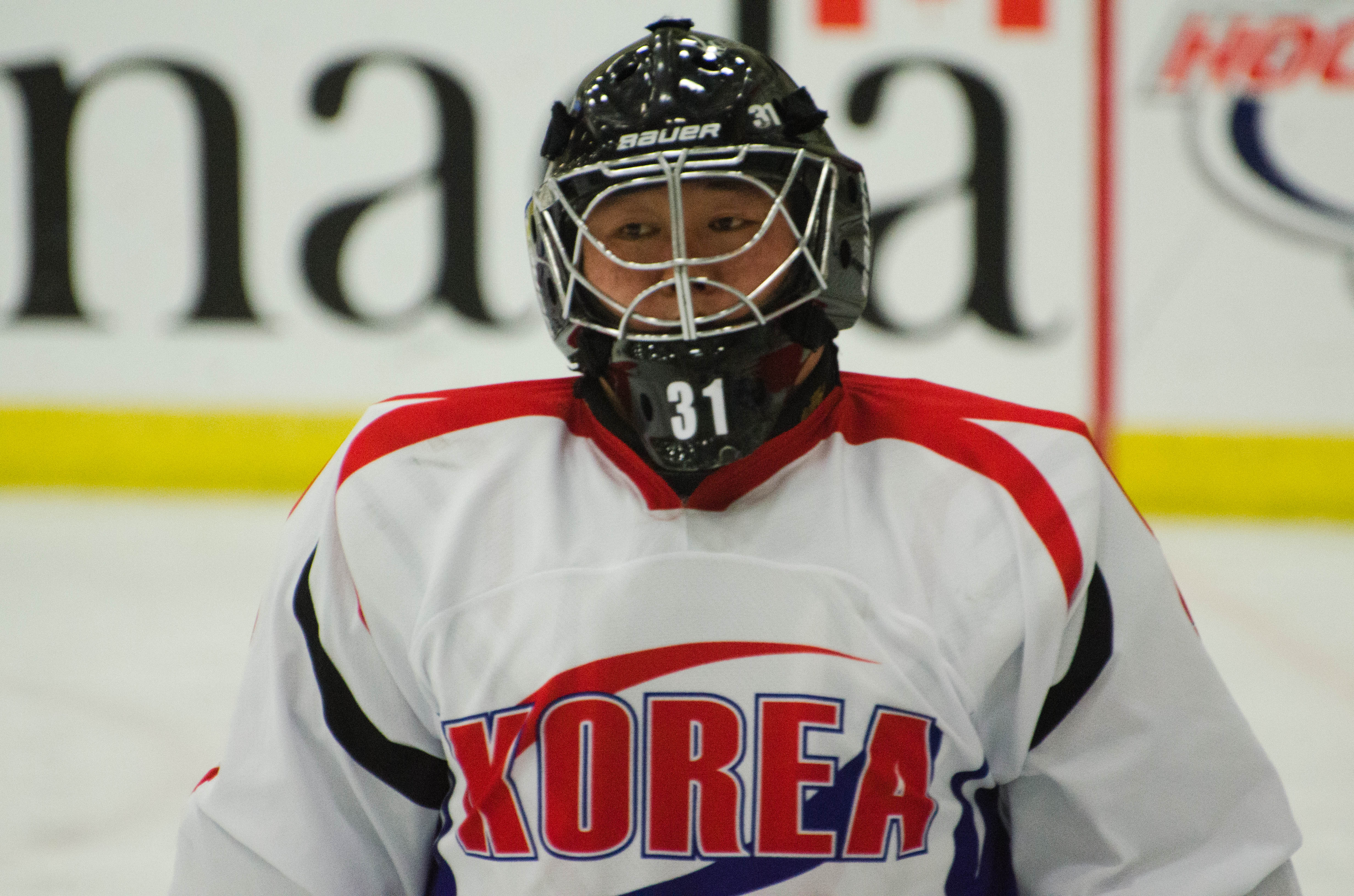 Yu Man-gyun, 2015